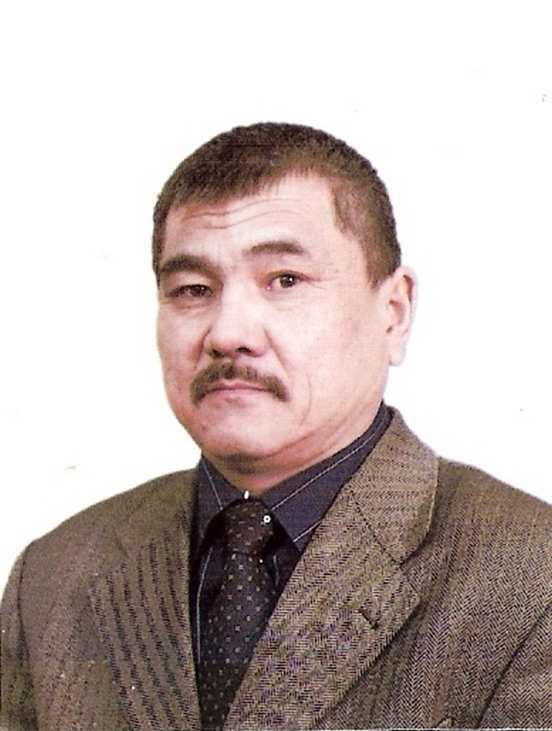 Аңғар Смағұлов